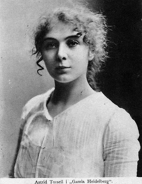 Astri Torsell